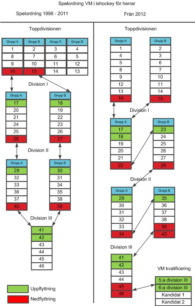 Spelform för världsmästerskapet i ishockey för herrar. Ny spelform från och med 2012.